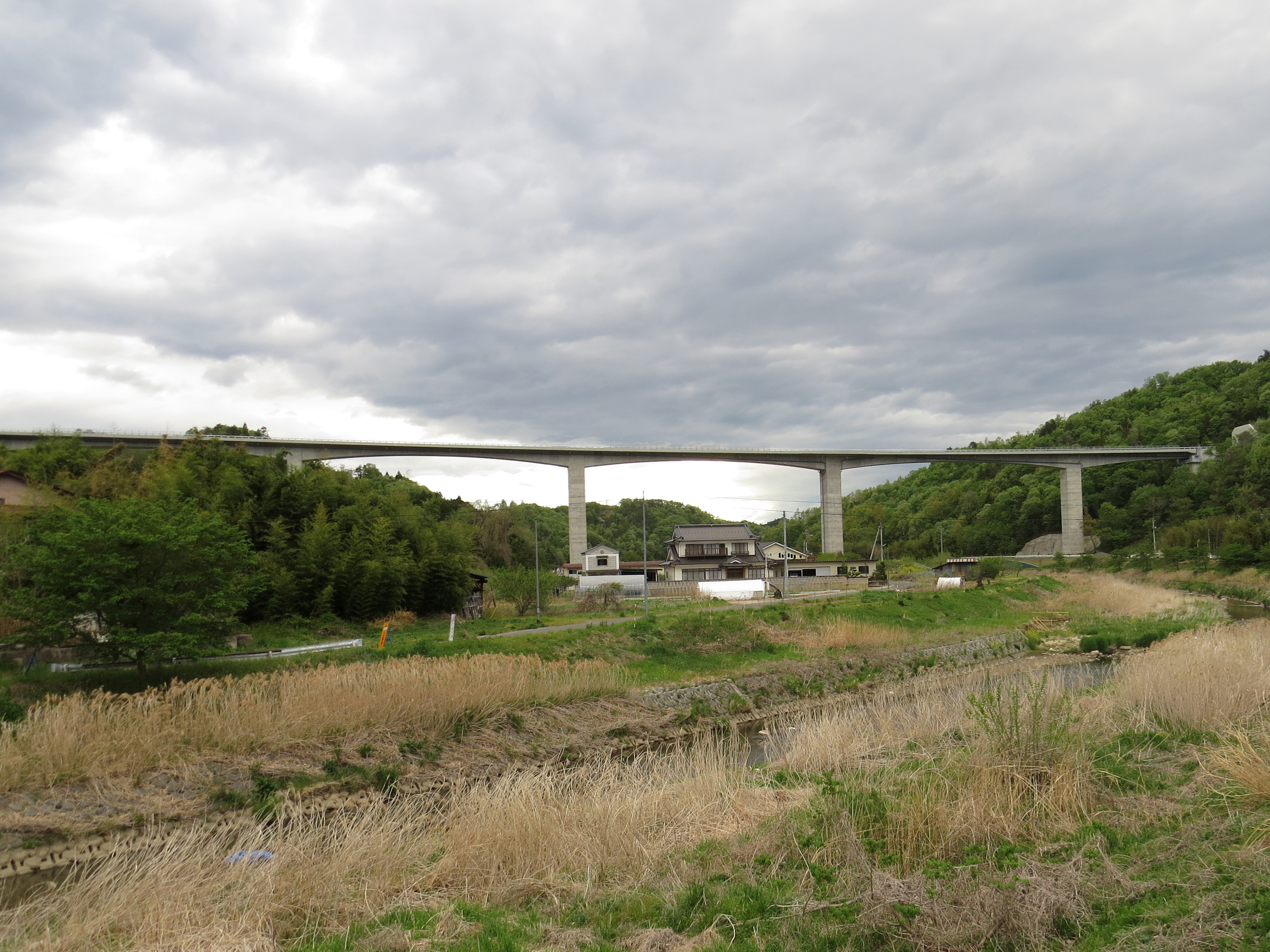 福島県伊達市で建設中の東北中央自動車道